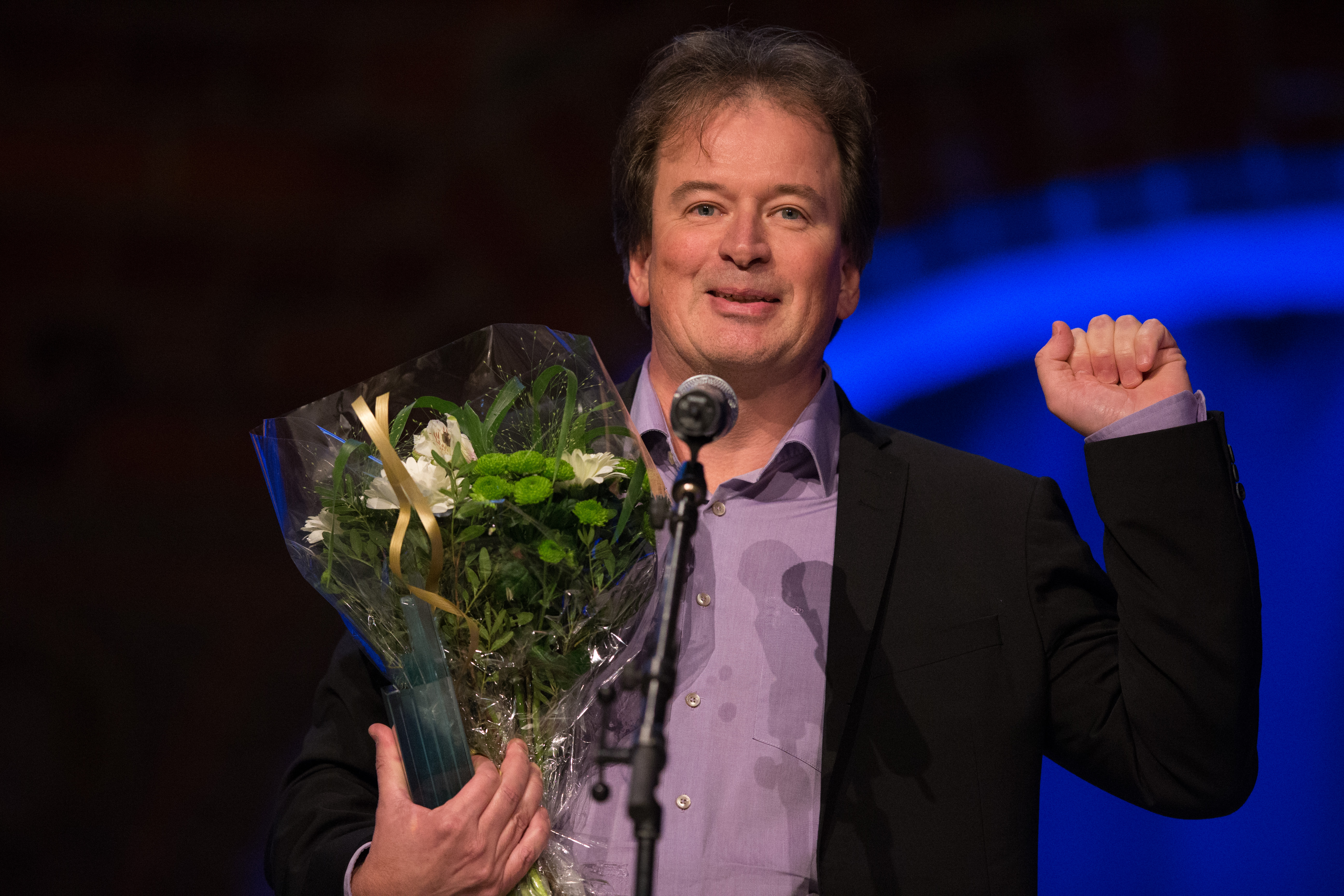 Kjell Westö, vinner av Nordisk råds litteraturpris 2014. Foto: Magnus Fröderberg /